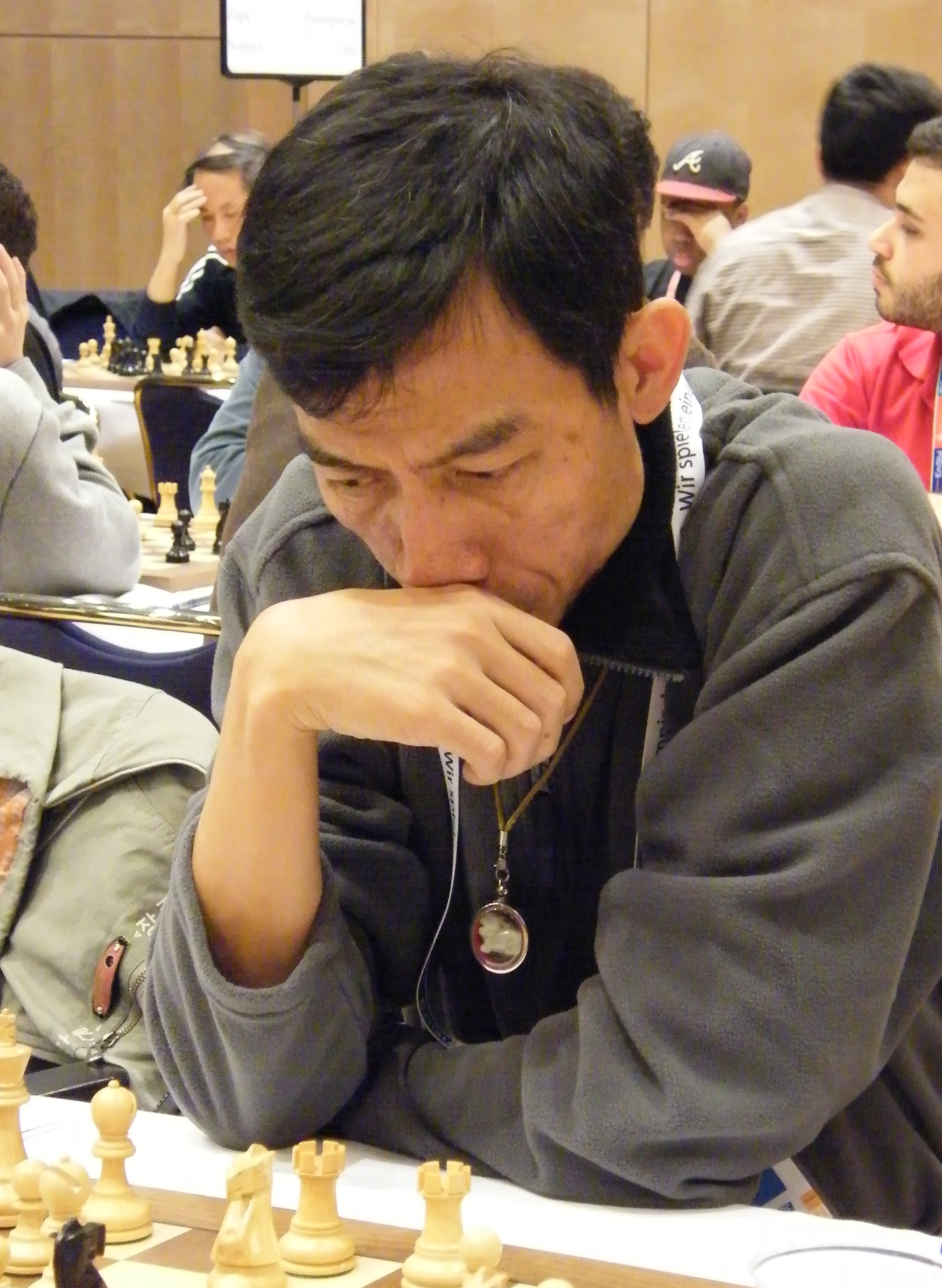 FM Boonsueb Saeheng bei der 38. Schacholympiade in Dresden 2008